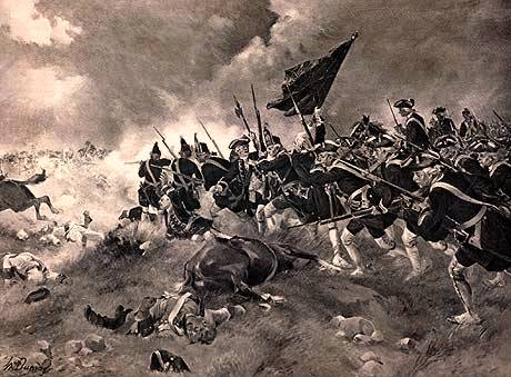 Battle of Dettingen, 1743